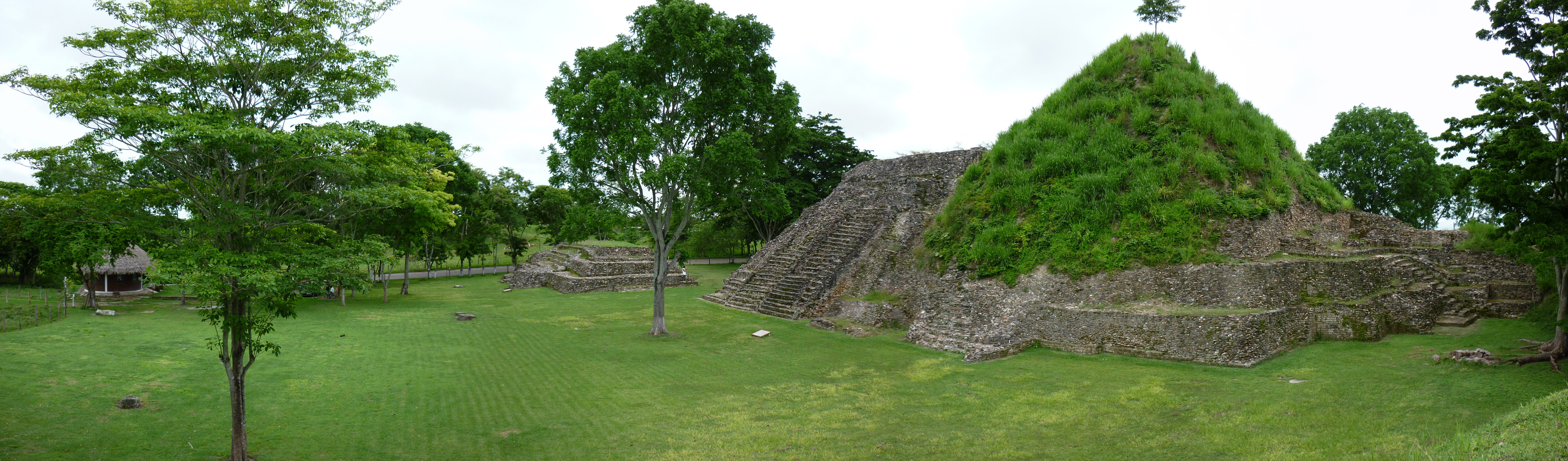 Zona arqueológica de Moral-Reforma, Balancán